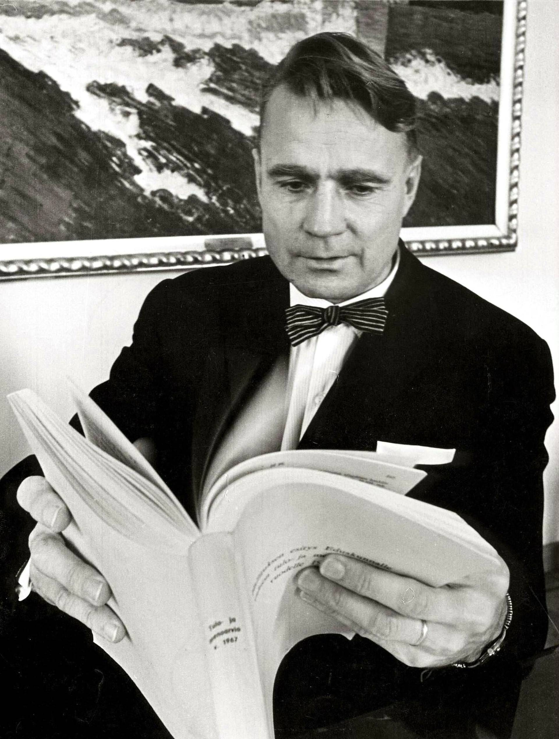 Valtiovarainministeri Mauno Koivisto lukee vuoden 1967 tulo- ja menoarvioesitystä.